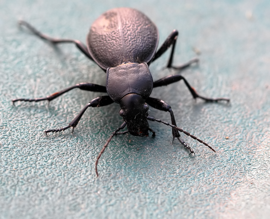 Sachsen. Überwinterung in frei aufgestelltem Gerätebehälter: Leder-Laufkäfer